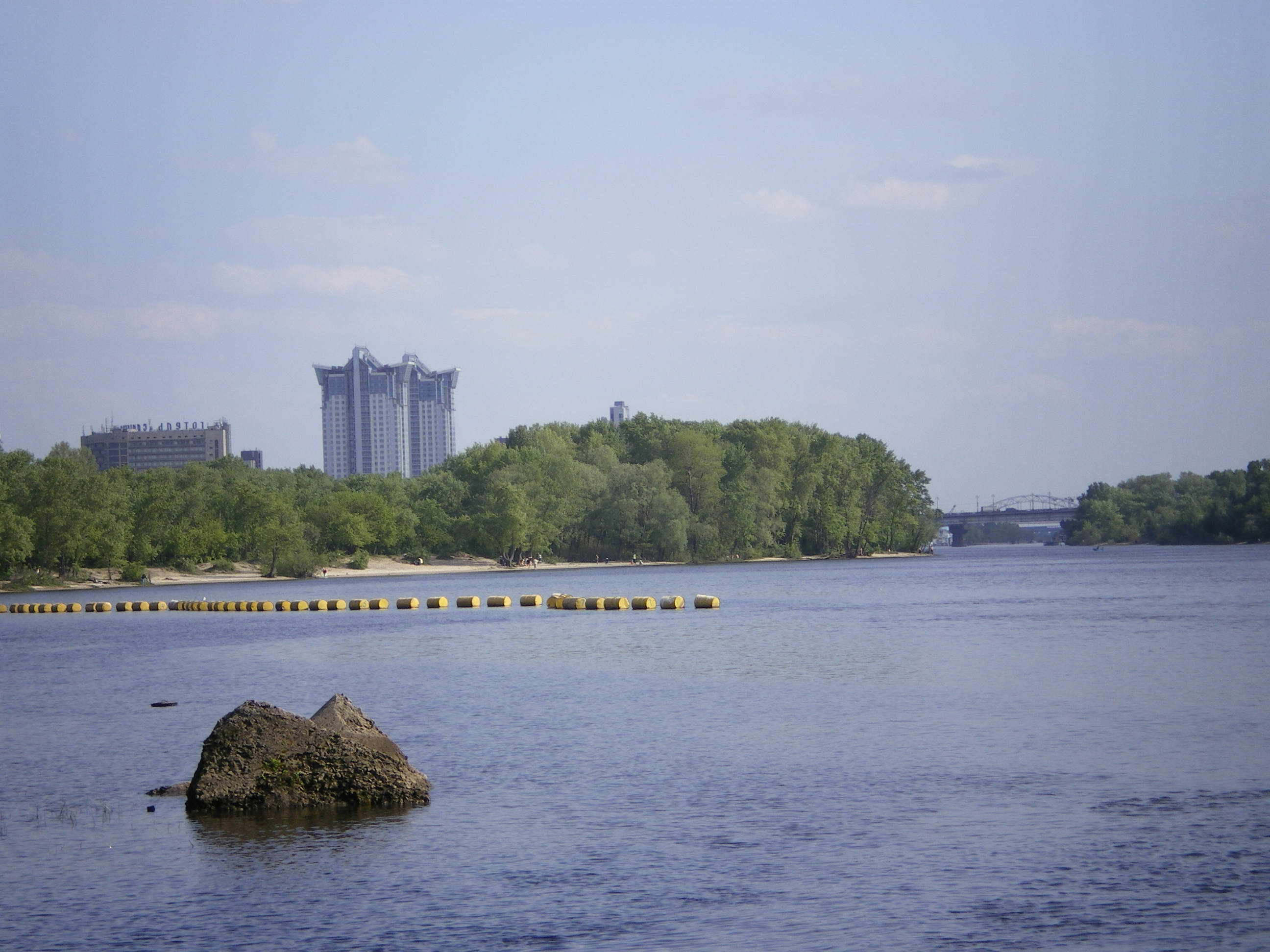 Киев. Десенка Вид с левого берега от метромоста вниз по течению на мост Патона и ж.д. мост